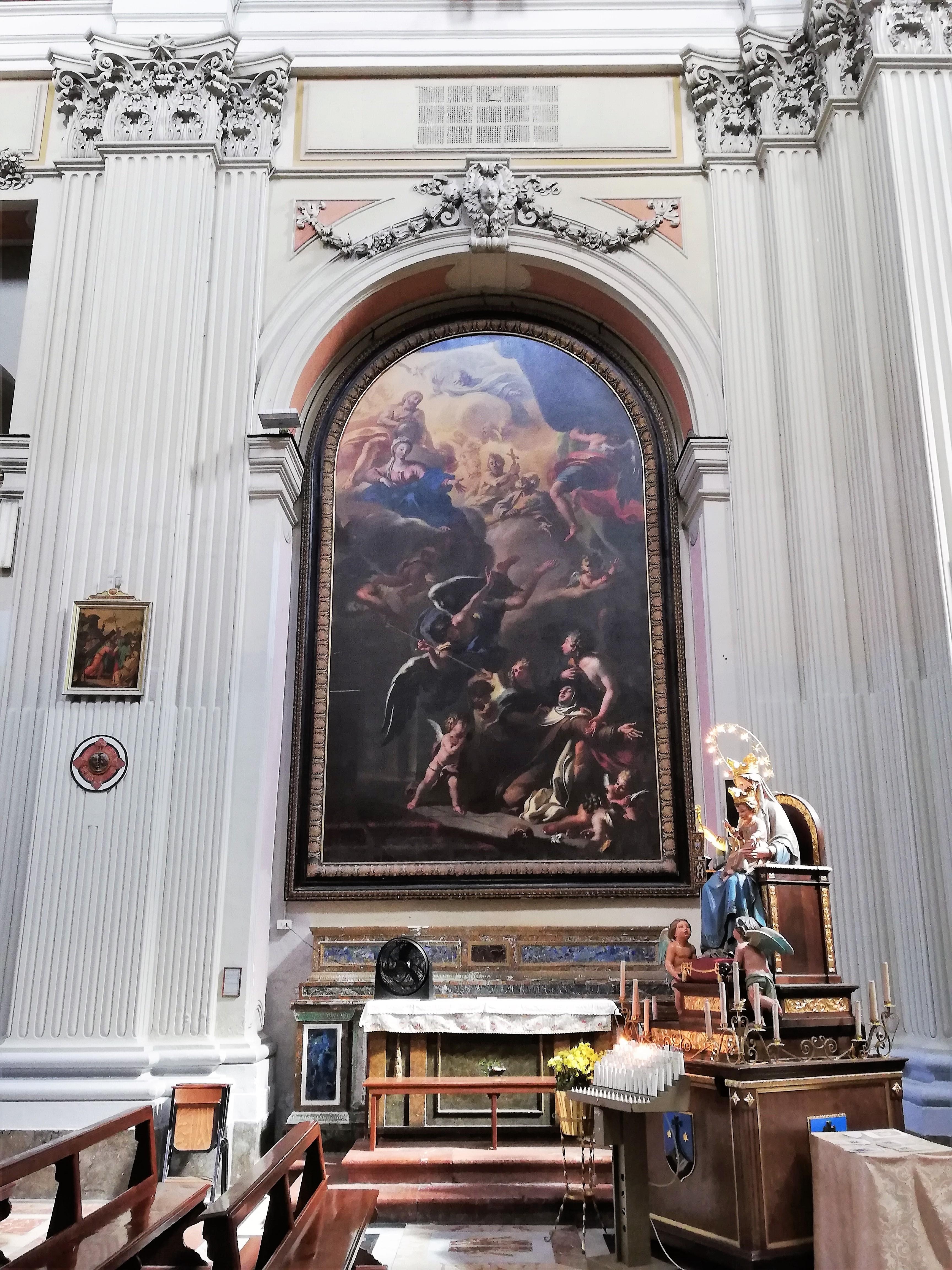 Altare laterale sinistro. Cappella di Santa Teresa d'Avila. Dipinto di Guglielmo Borremans.